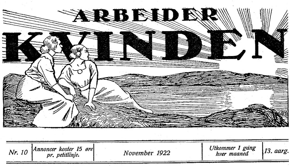 Tidsskriftet til Arbeiderpartiets kvindeforbund